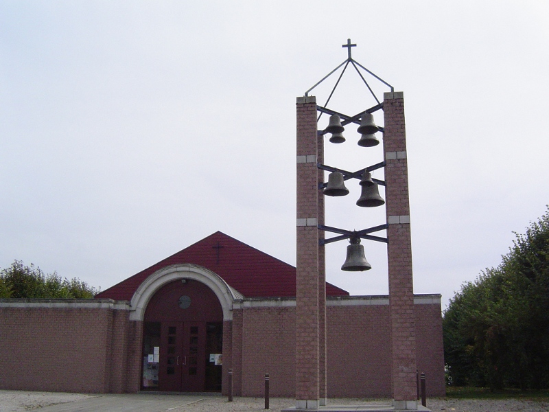 Église de Bauffe, construite en 1992. Photo prise en septembre, à midi.